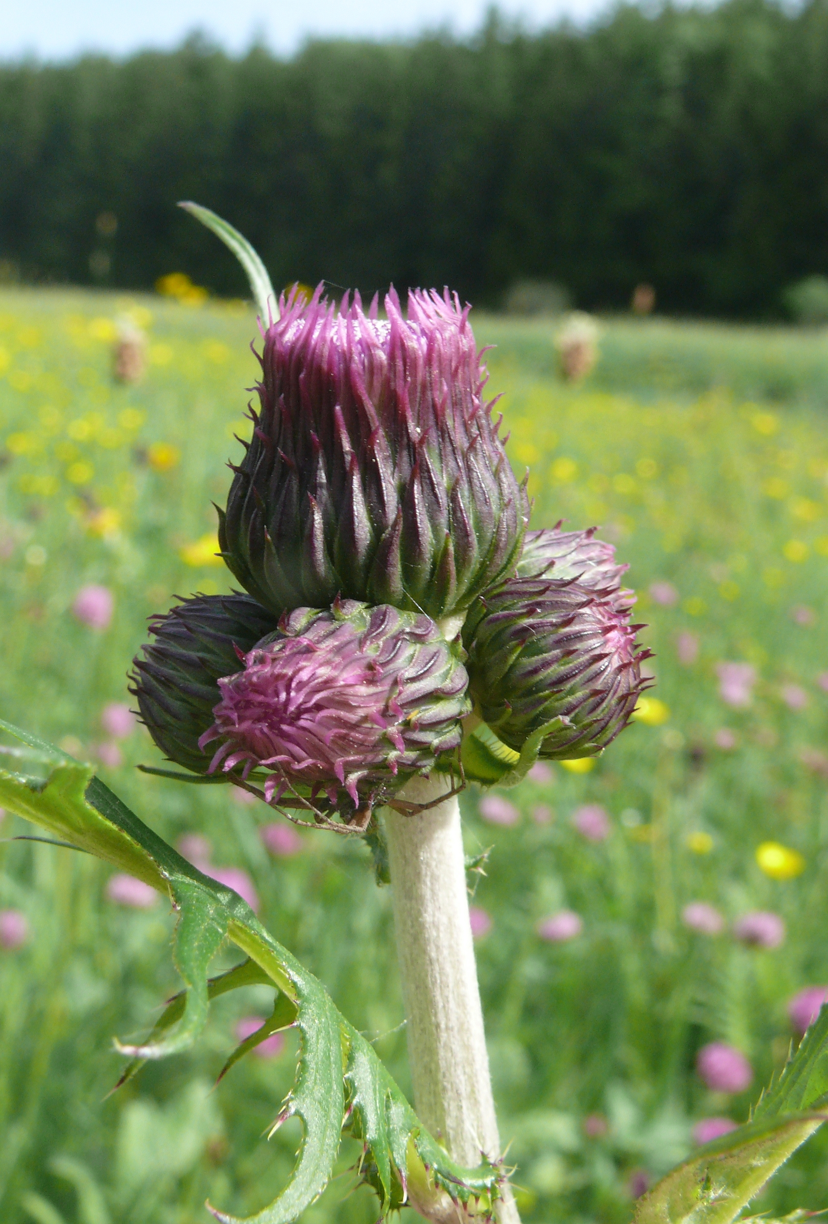 Cirsium rivulare, Schwäbische Alb, Deutschland